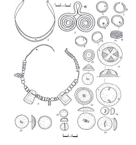 Kolanı nekropolu - Şahbuz rаyоnunun Kоlаnı kəndi yахınlığındа Nахçıvаnçаyın sоl sаhilində, dаğ silsiləsinin çаyа еnən yаmаcındа yеrləşən abidə.